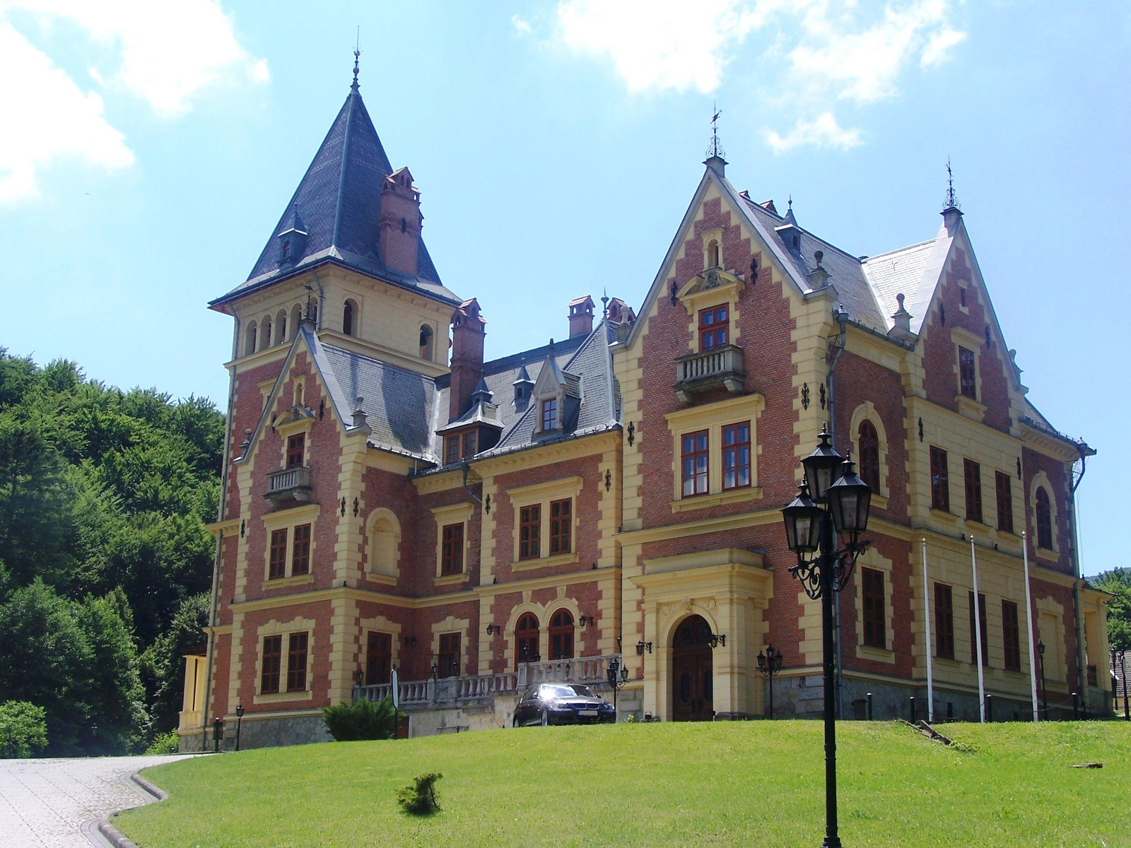 Károlyi-kastély (Kastélyhotel Sasvár) (Parádsasvár, Kossuth Lajos u. 1.) This is a photo of a monument in Hungary. Identifier: 5819